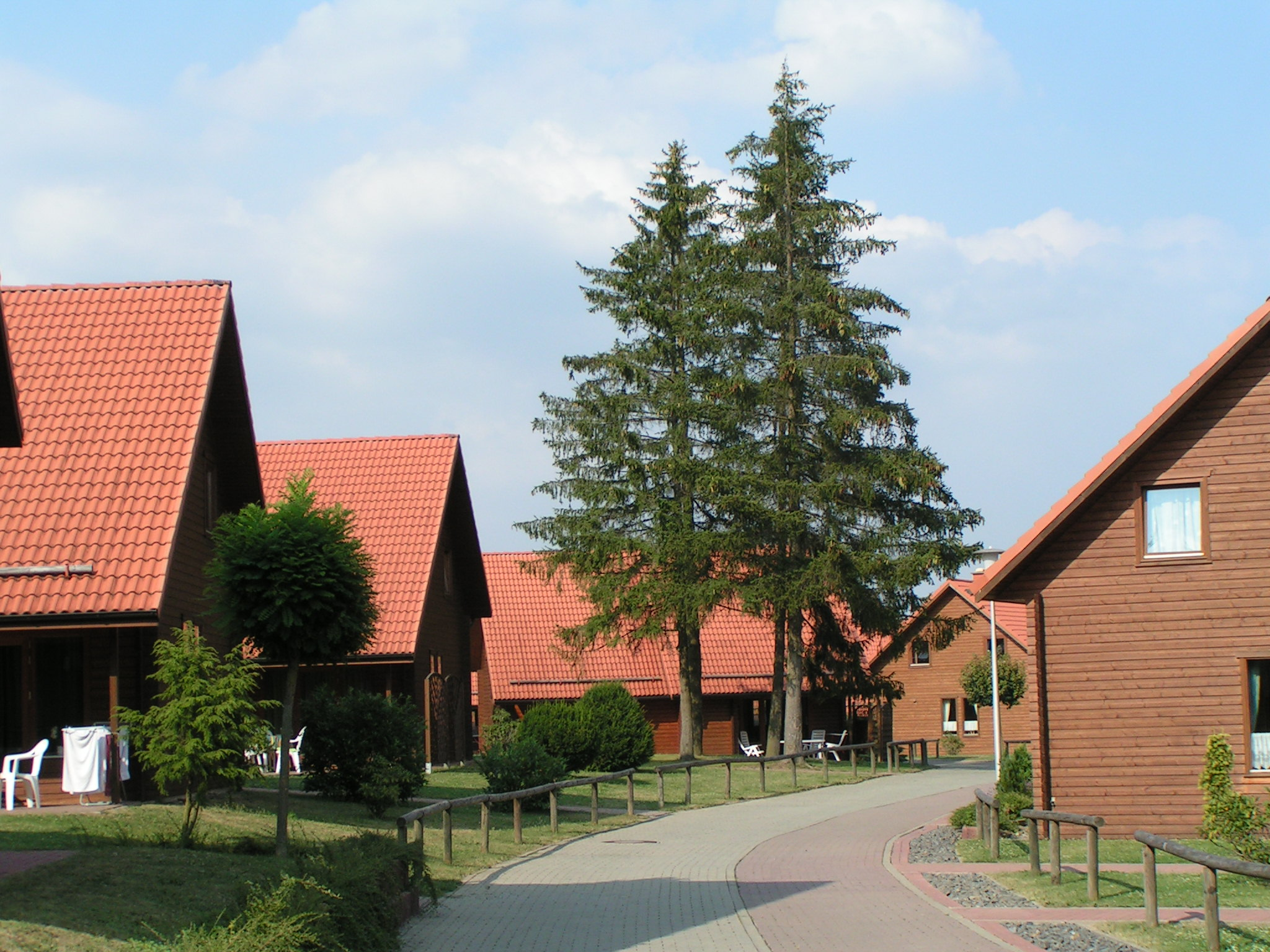 Ferienhaussiedlung in Hasselfeld-Rotacker